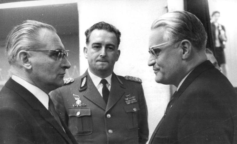 Zentralbild Sturm 18.4.1967 bgm-ki. VII. Parteitag der SED - 18.4.1967. Das Mitglied des Politbüros des ZK der SED, Paul Verner, der Präsident der Deutschen Volkspolizei Berlin, Generalmajor Horst Ende, und Gerald Götting, Generalsekretär der CDU und Stellvertreter des Vorsitzenden des Staatsrates (v.l.n.r.), im Gespräch während einer Tagungspause.